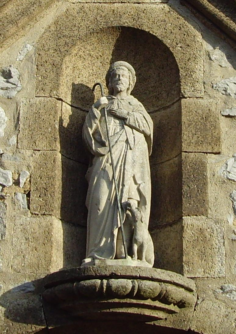 Rochusstatue der Rochuskapelle Offheim